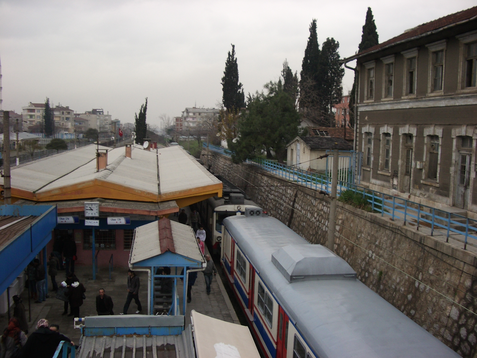 Gebze